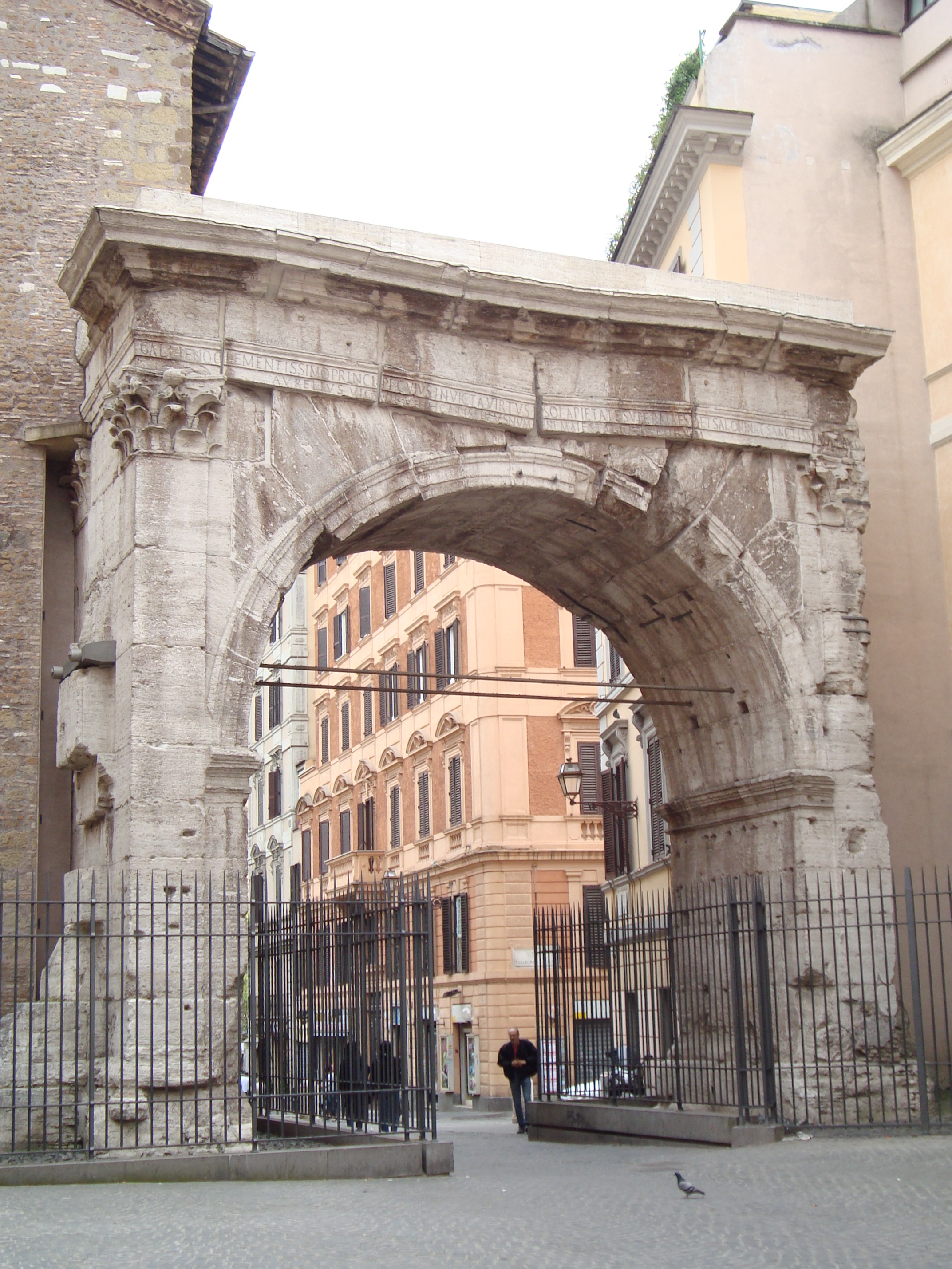 L'Arc de Gallien (Arco di Gallieno) à la Porte Esquiline de Rome